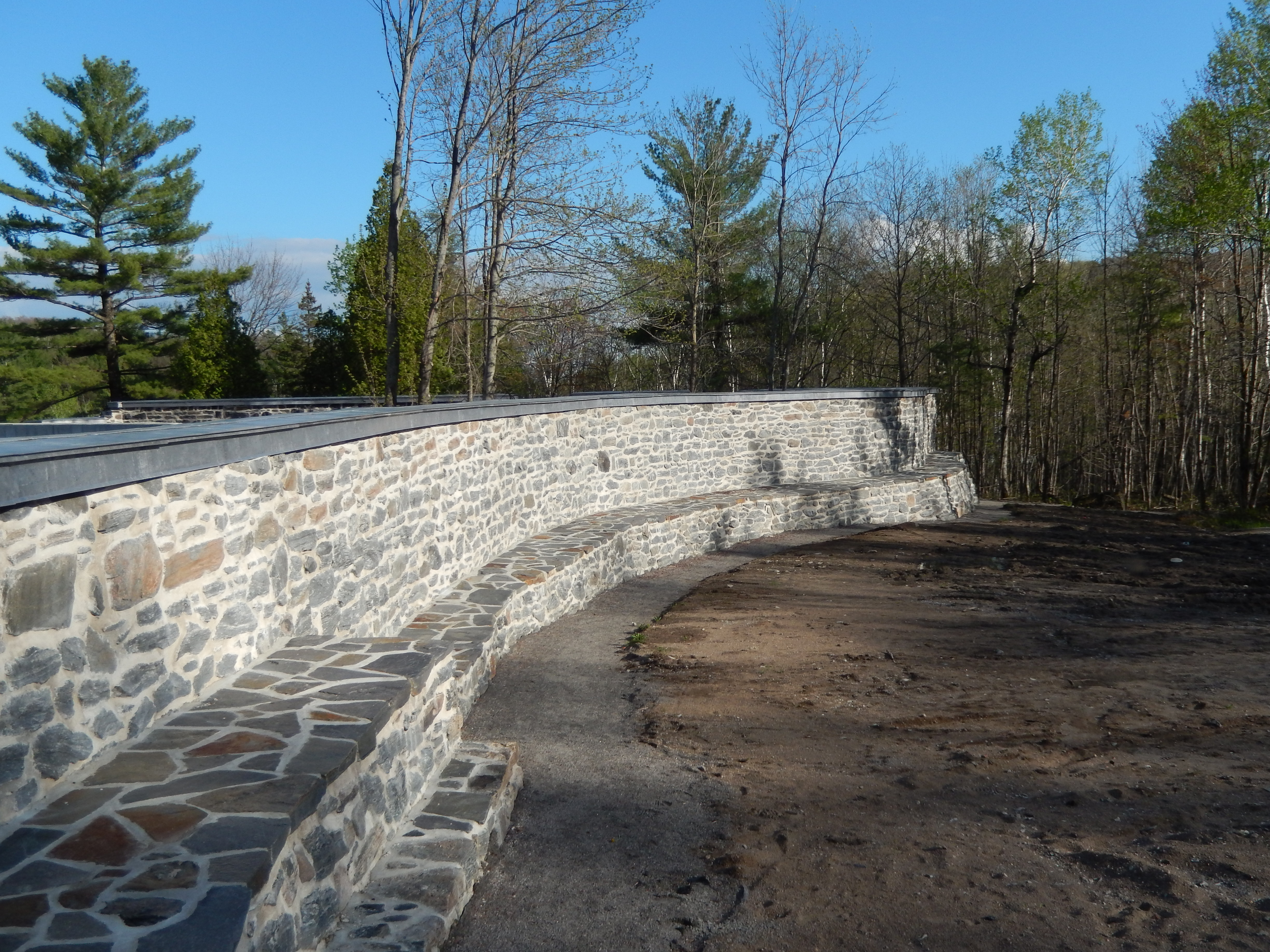 ancien barrage de Saint-Narcisse